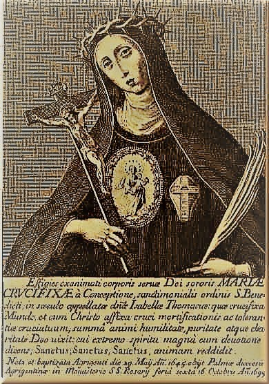 ritratto di Isabella Tomasi di Lampedusa (1645-1699), monaca con il nome di Maria Crocifissa